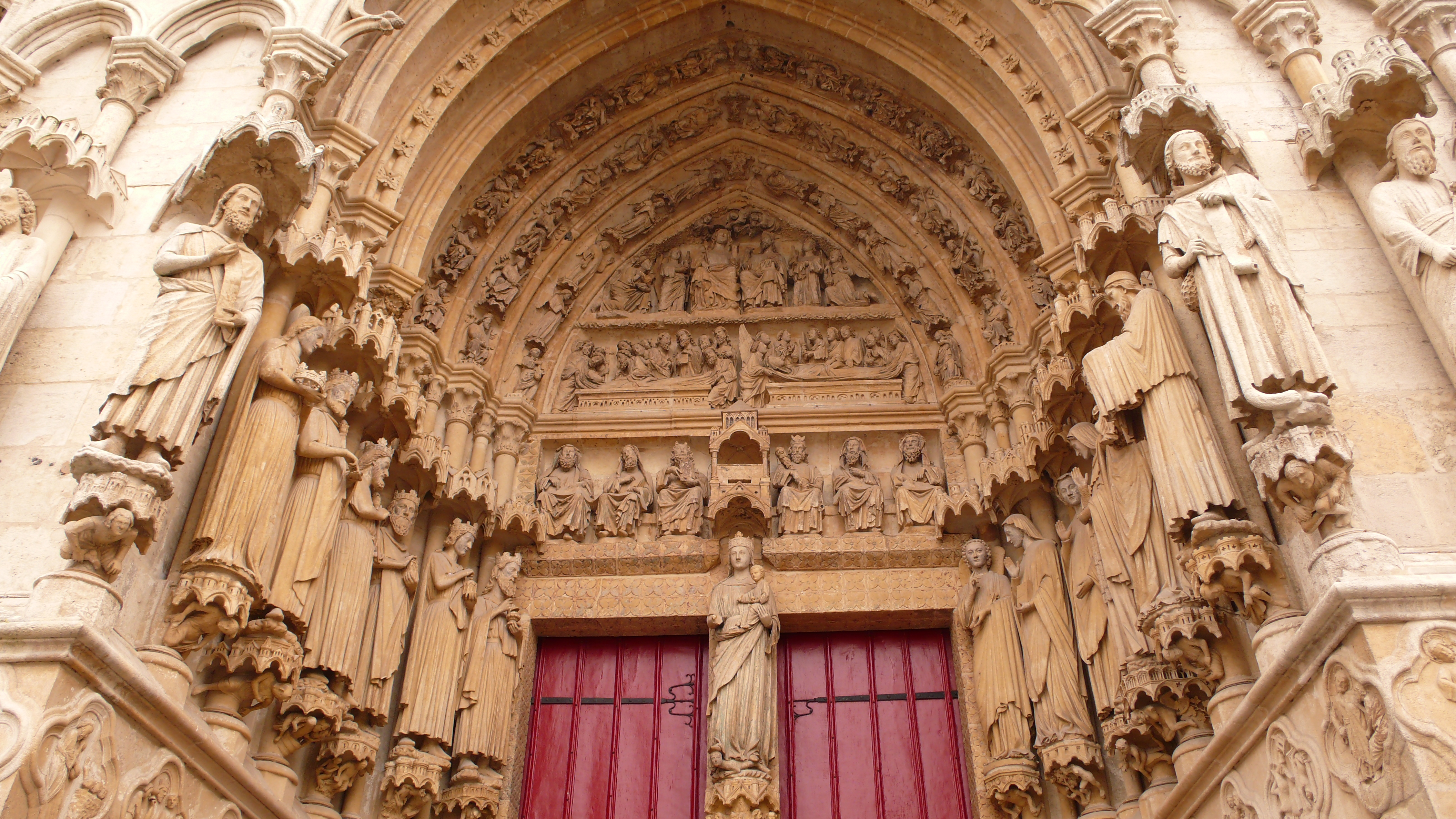 Kathedrale von Amiens, Frankreich, Westfassade, Rechtes Portal (Maria)